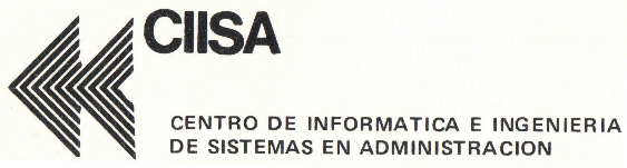 Logo del Instituto CIISA en sus inicios (1979).